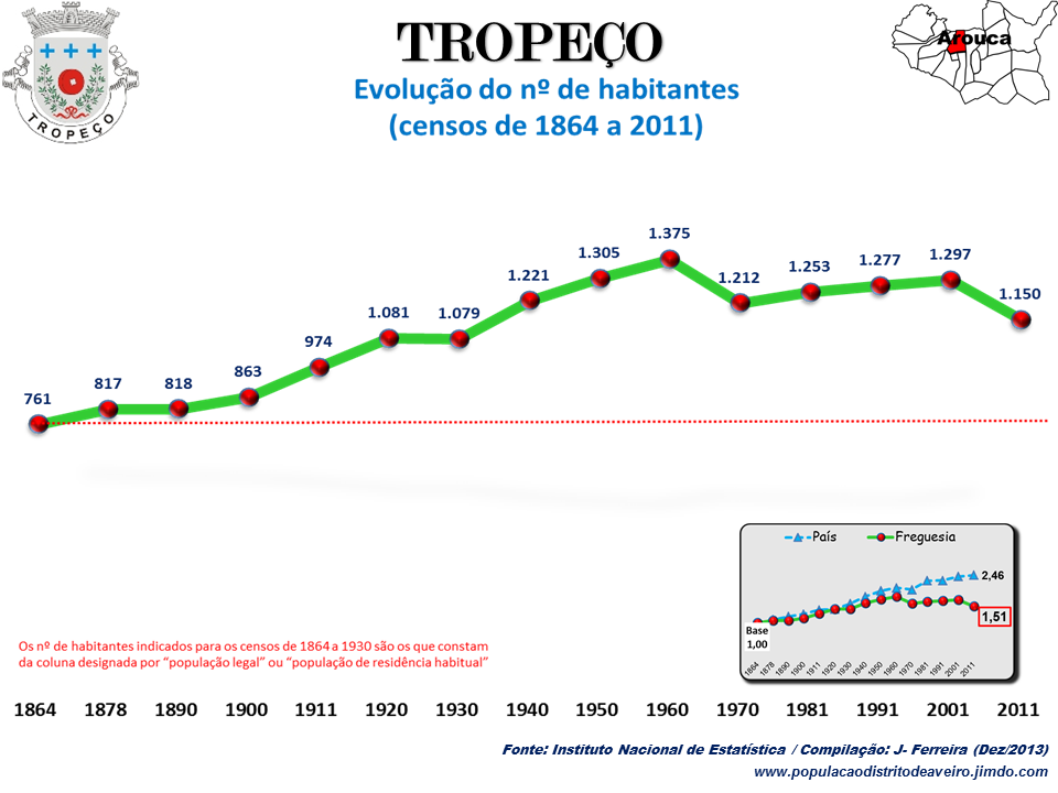 Evolução da População 1864 / 2011